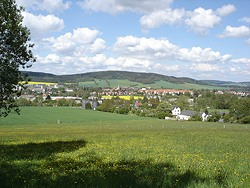 Webmaster wilthen.de